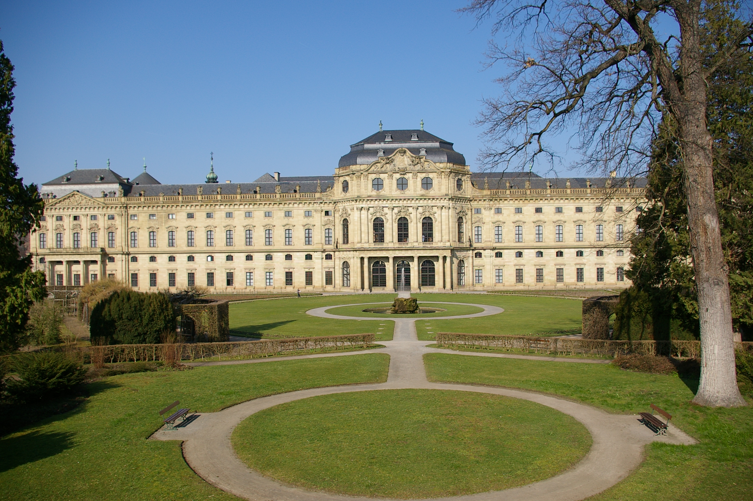 Residenz und Residenzgarten Würzburg